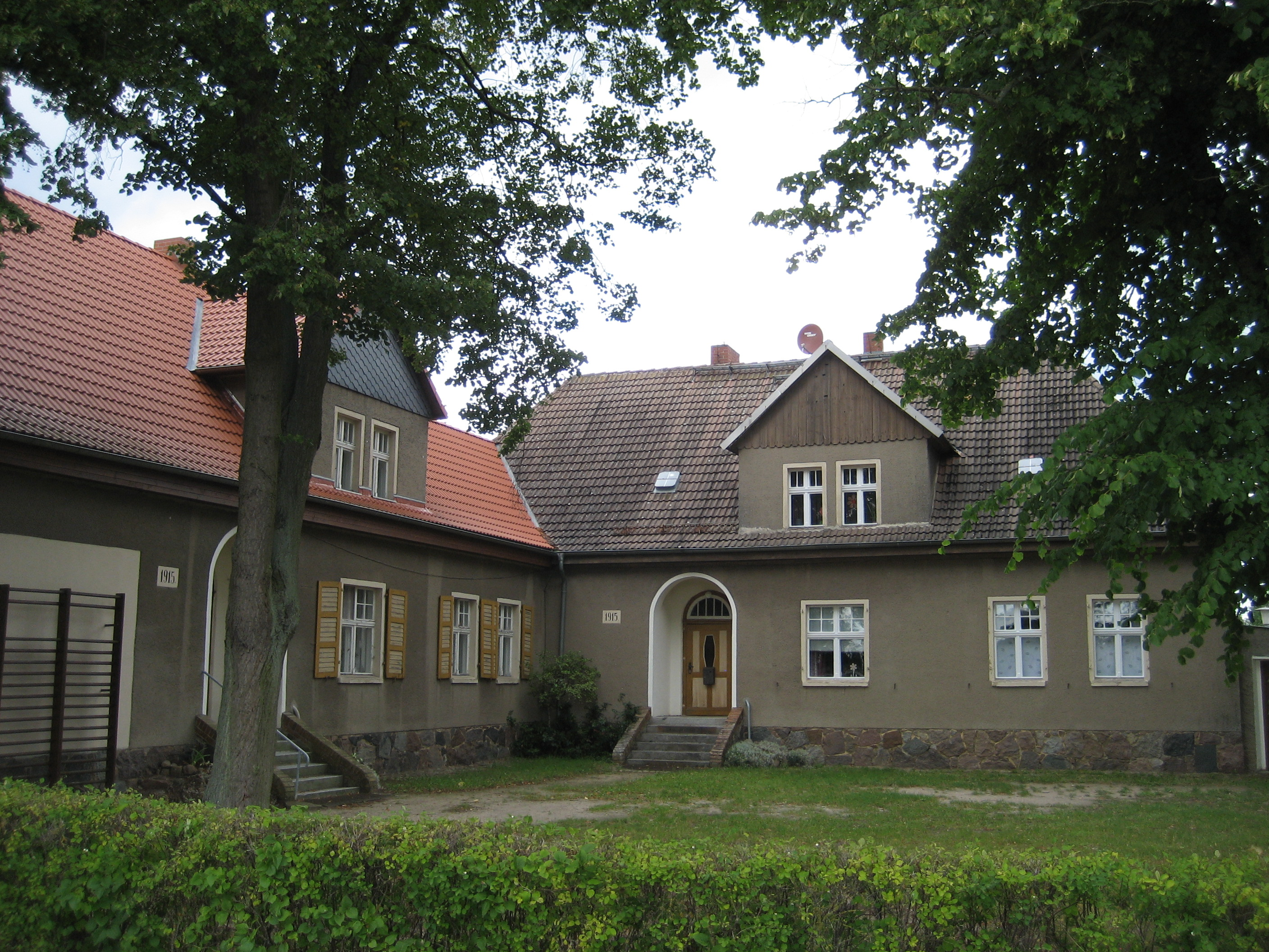 Das Alte Schulhaus von Rossow aus Bickrichtung Südosten, in dem sich u.a. das Museum "Historische Schulstube" befindet.